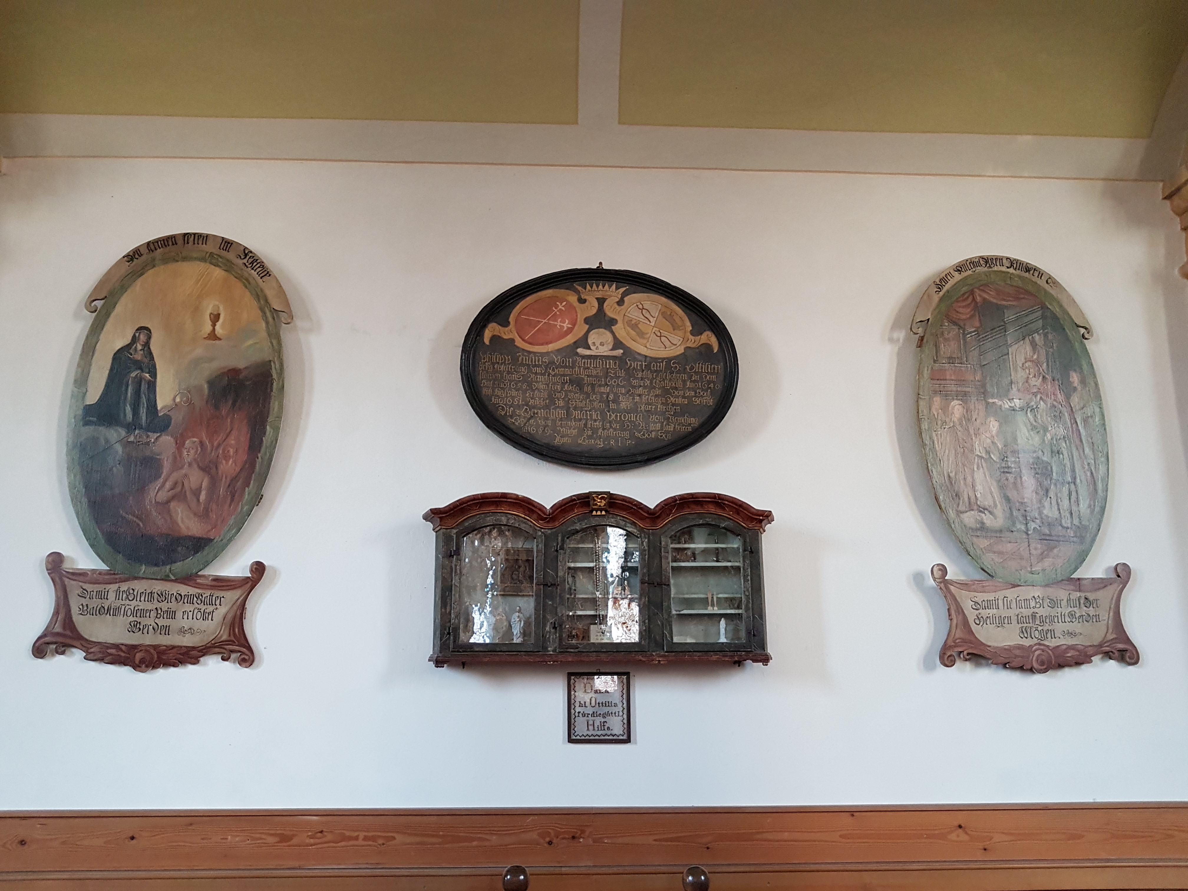 Hörmannshofen (Biessenhofen), Wallfahrtskirche St. Ottilia, Votivtafeln und Schreine mit Votivgaben unterhalb der Empore.